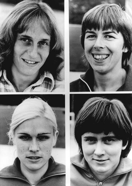 Johanna Klier, Monika Hamann, Carla Bodendorf, Marlies Göhr ADN-ZB Reiche 19-8-78 Potsdam: DDR-Nationalstaffel lief Weltrekord- Beim DVfL-Sportfest in Potsdam lief die DDR-Nationalstaffel der Frauen am 19.8.78 in der Besetzung mit Johanna Klier (oben links) , Monika Hamann (oben rechts) , Carla Bodendorf (unten links) und Marlies Göhr (unten rechts) in 42,27 s einen neuen Weltrekord über 4 x 100 m. Information added by Wikimedia users.* Johanna Schaller (Johanna Klier) Monika Hamann Carla Bodendorf Marlies Göhr